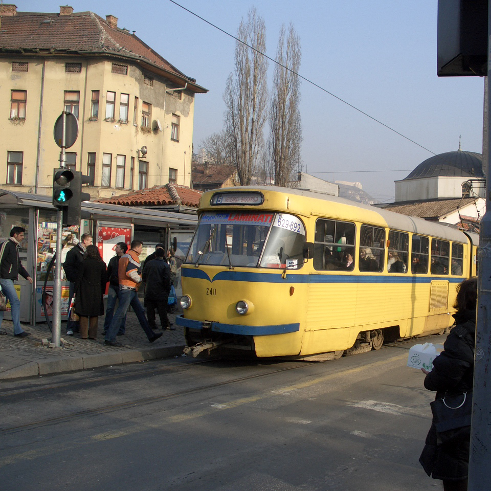 Tramvaj Tatra K2 v sarajevské Baščaršiji, BiH